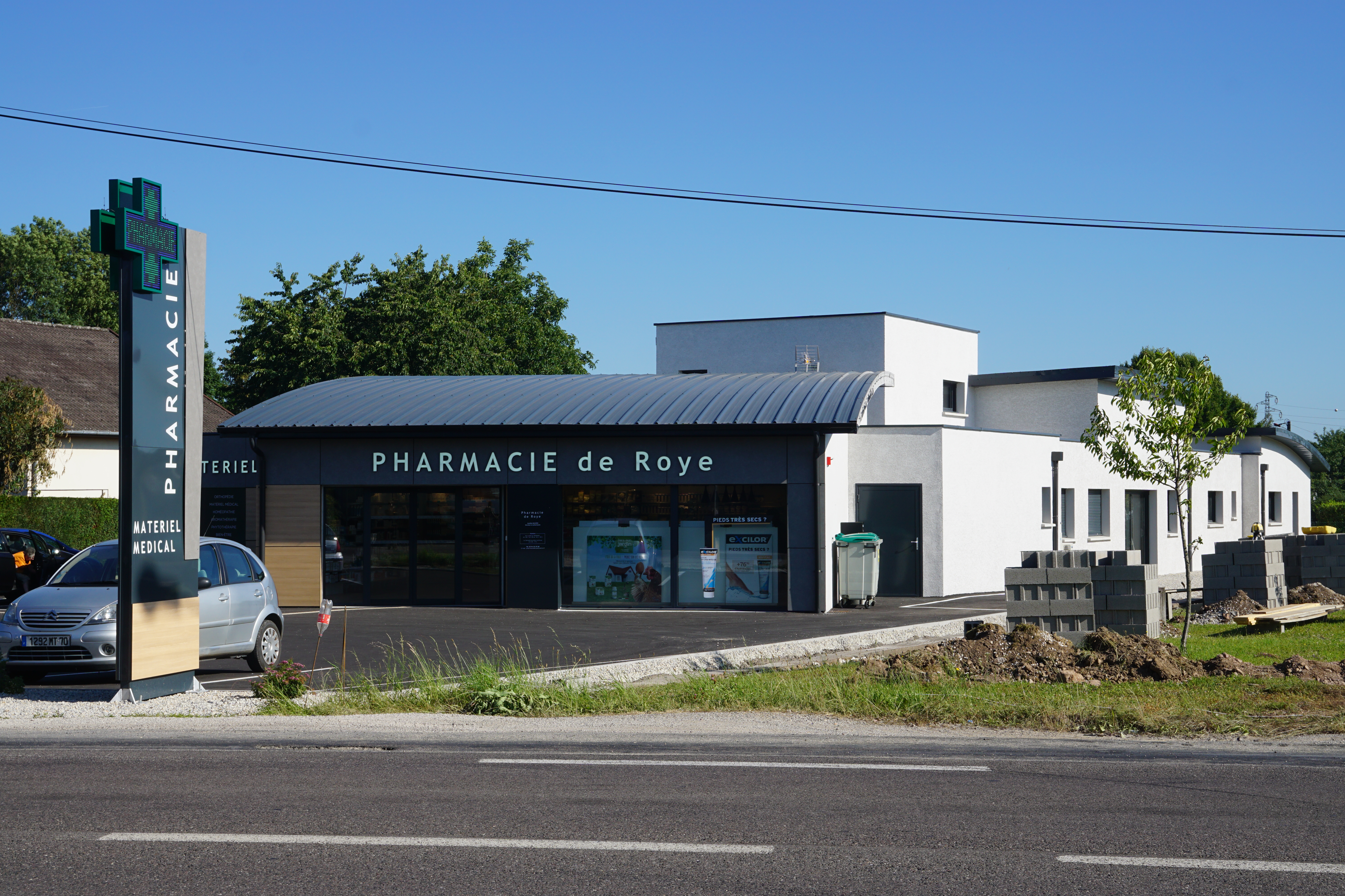 La pharmacie et le pôle médicale de Roye (Haute-Saône).